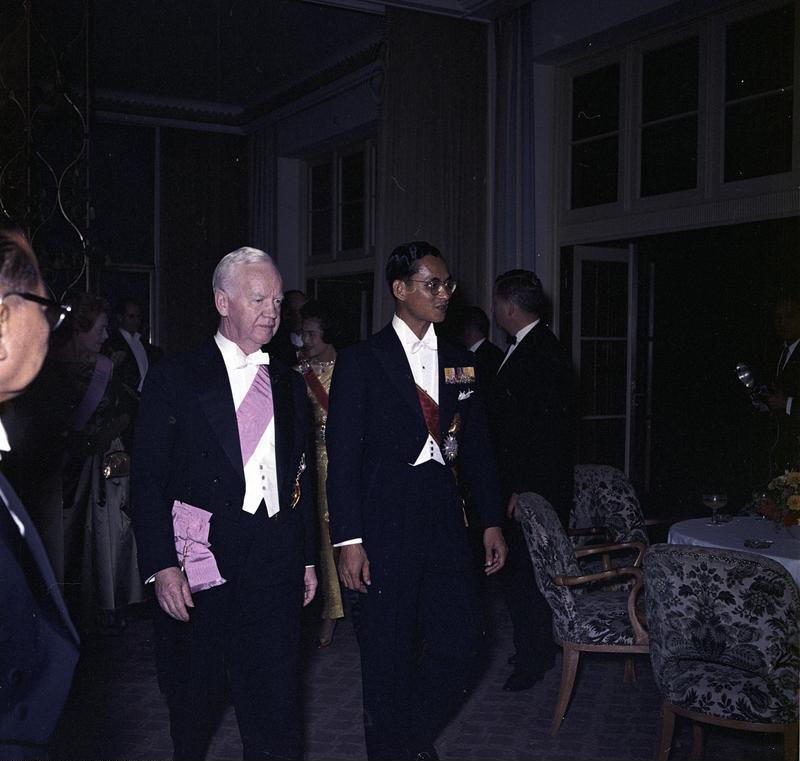 Empfang für das thailändische Königspaar auf dem Petersberg